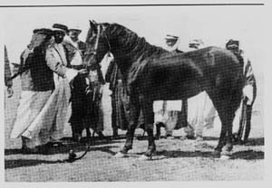 Haleb, vermutlich 1906